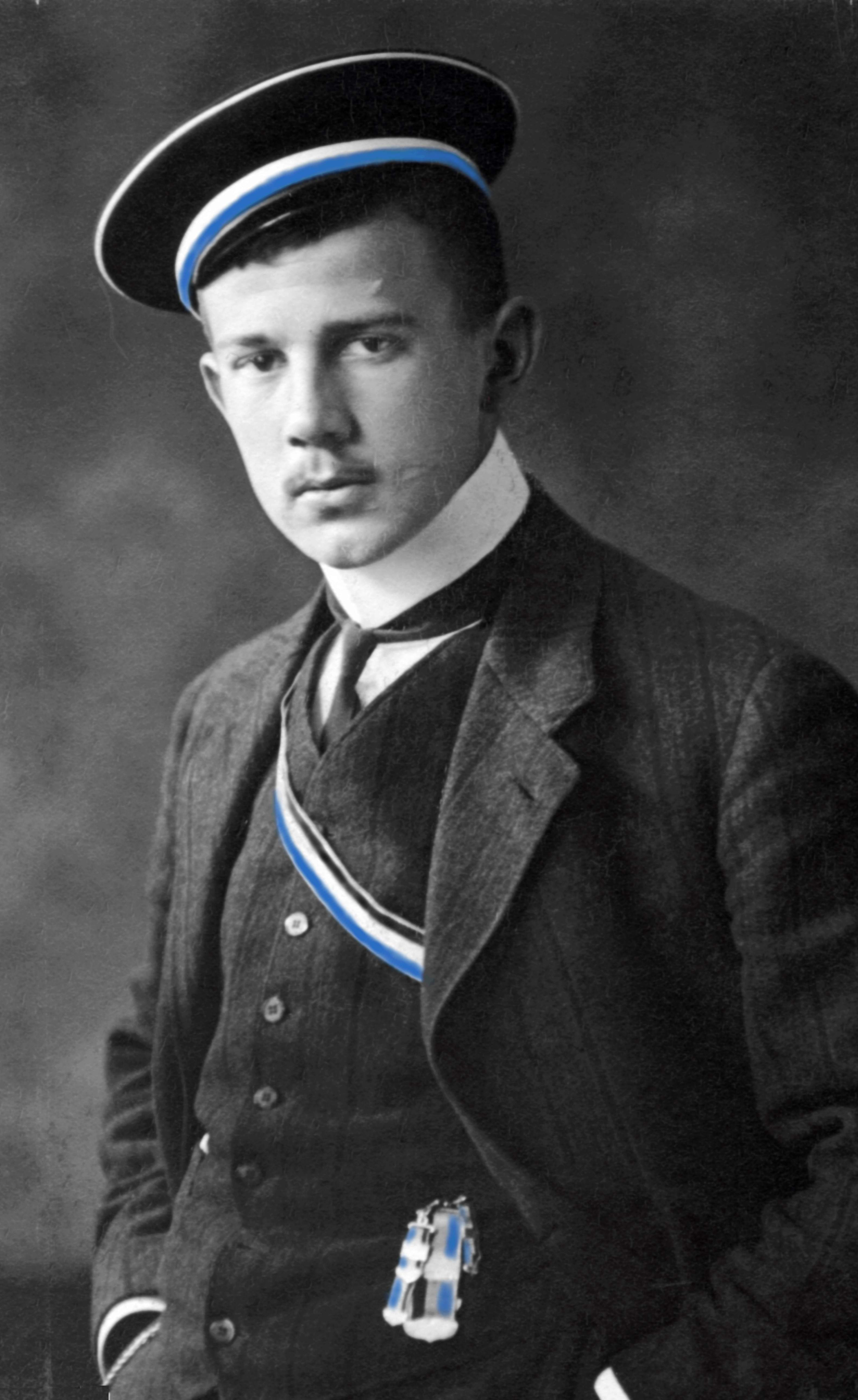 Bodo Karcher als Corpsbursche der Suevia München